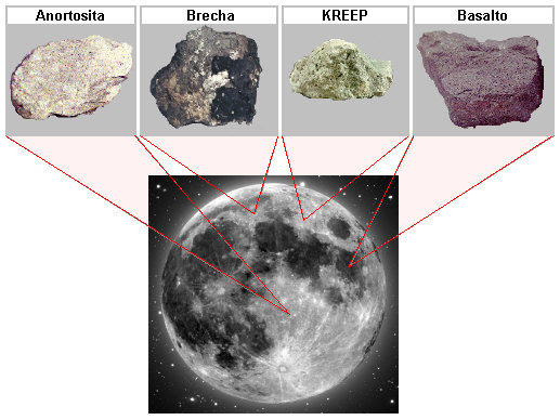 Descripción: tipos de rocas lunares y su distribución sobre la superficie. Origen: Fotografías de la NASA. Trabajo adicional: Luis María Benítez (ilustraciones adicionales). Autor(es): NASA y Luis María Benítez. Licencia: dominio público.